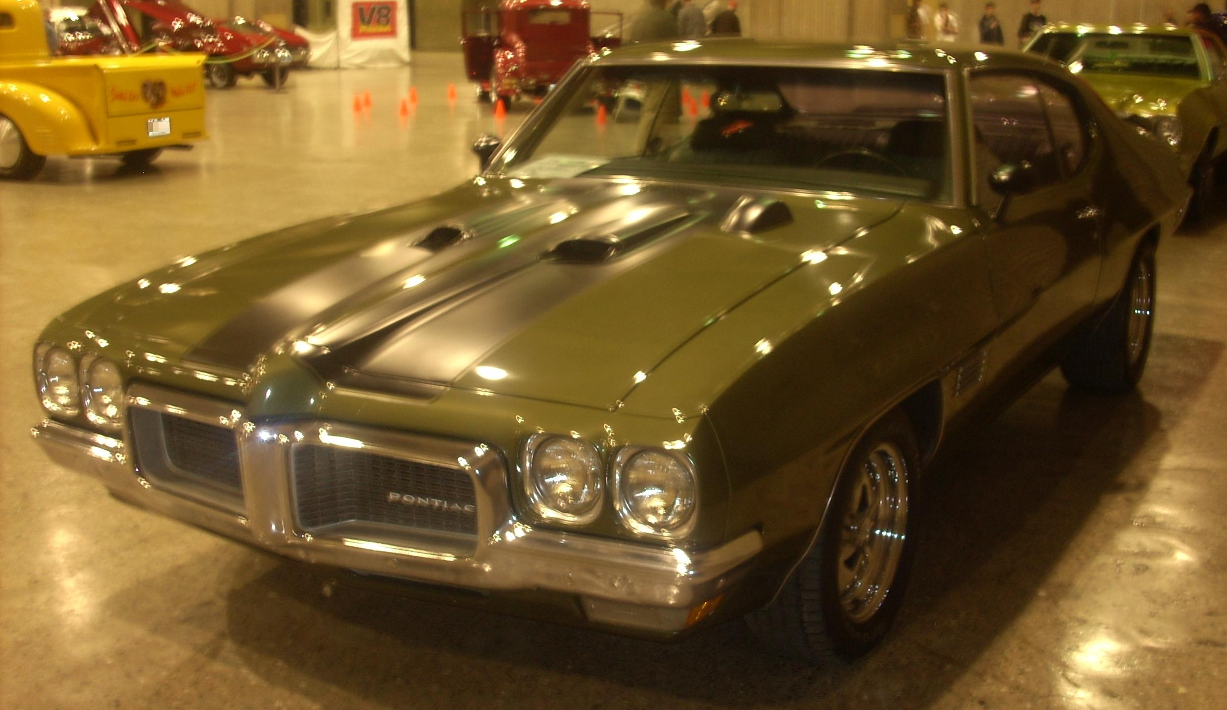 1970 Pontiac LeMans photographed at Auto classique Montréal 2008.